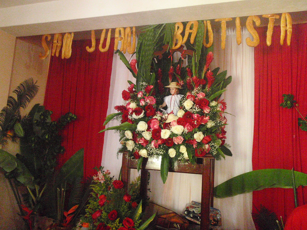 San Juan durante la velada en la casa de la familia Alvarado, en Curiepe (Edo. Miranda-Venezuela)